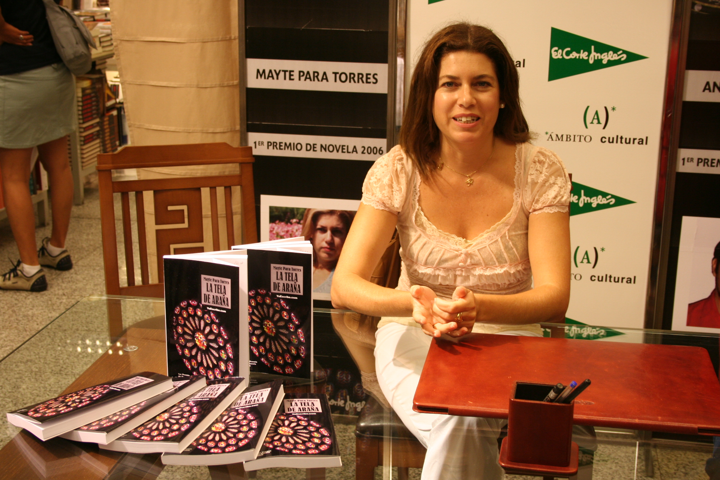 Firma de libros en El Corte Inglés de Mallorca. Septiembre de 2006